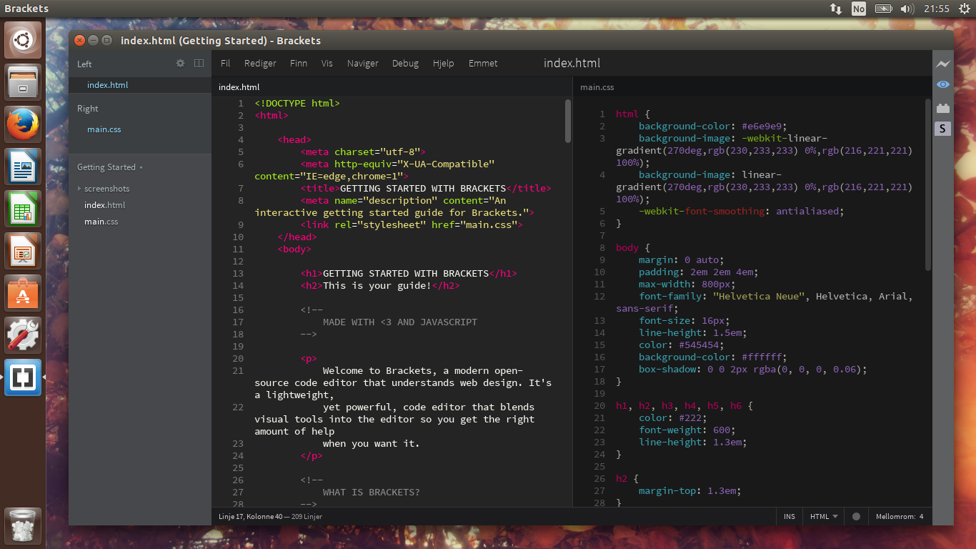 Brackets 1.1 under Ubuntu